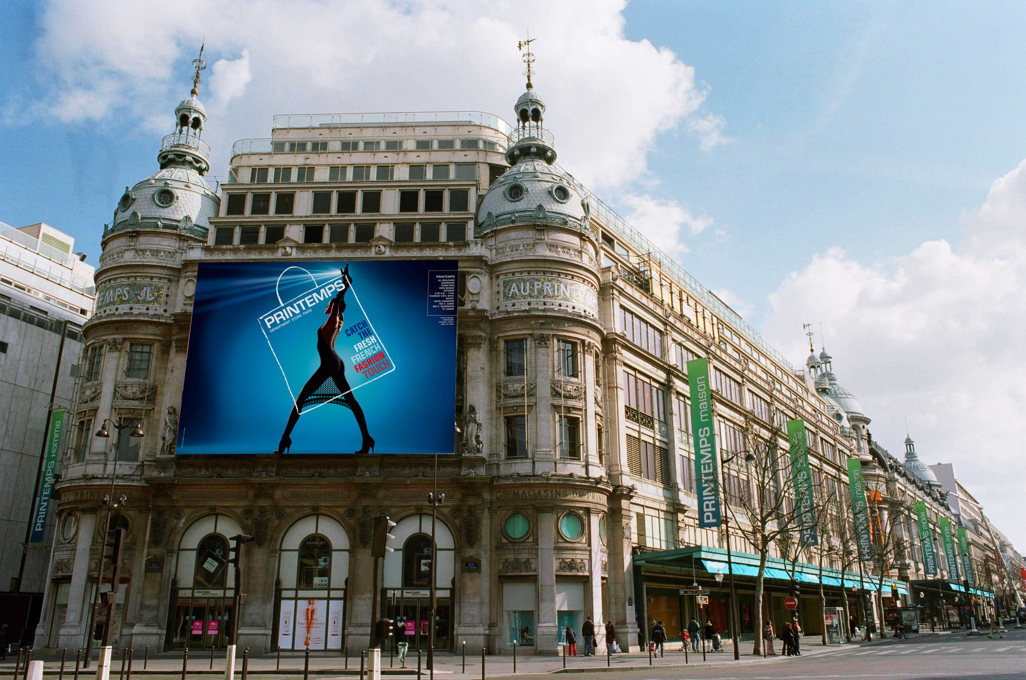 Métro Havre-Caumartin, façade du Printemps de la Maison